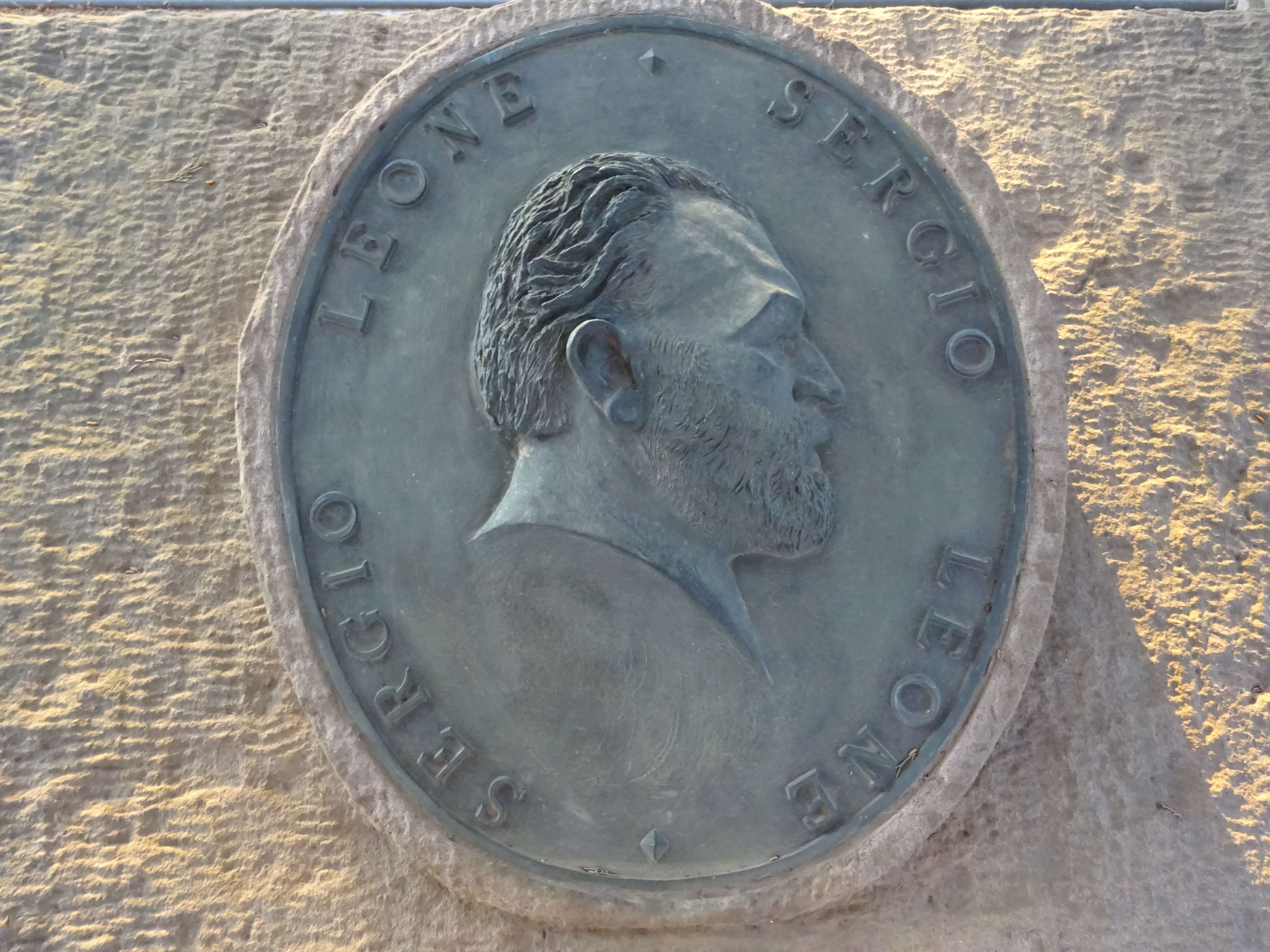 Grabstätte Sergio Leone in Pratica al Mare